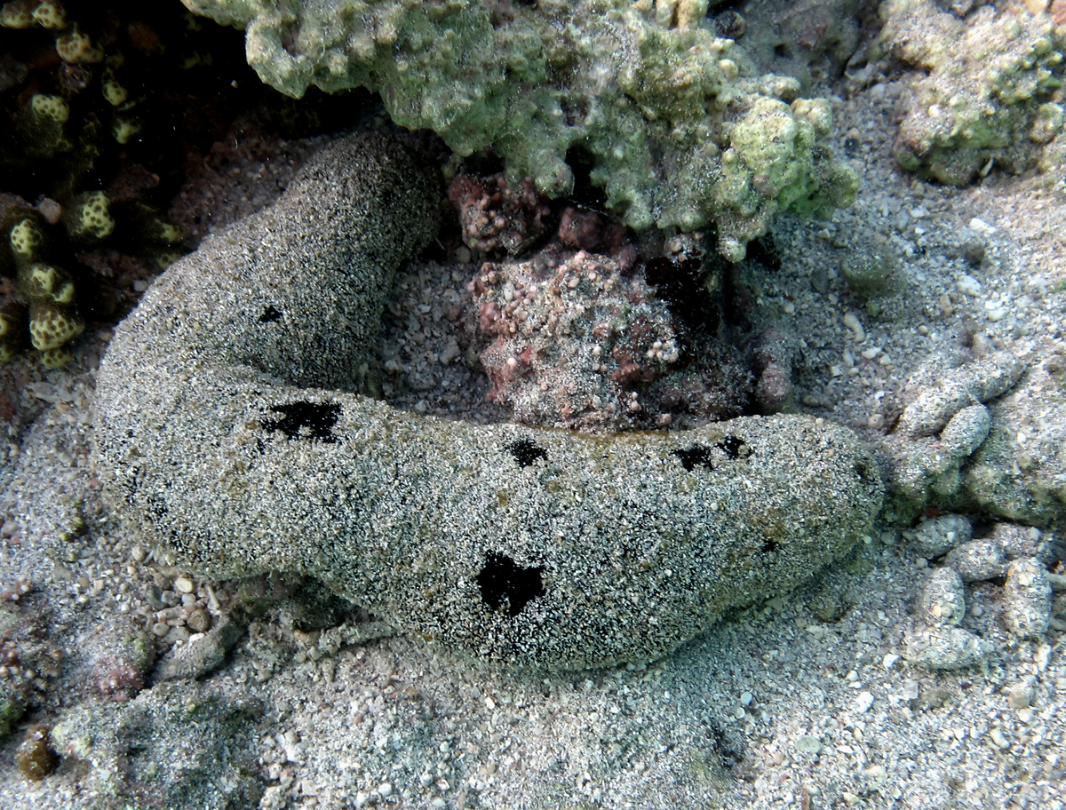 Holothurie Holothuria atra à la Réunion.